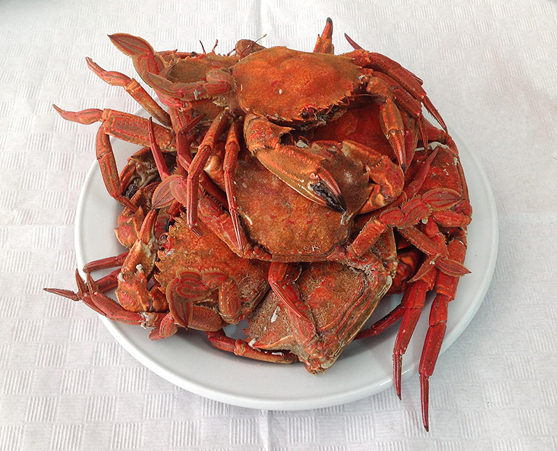 Gastronomía asturiana, marisco, Asturias, Andarica